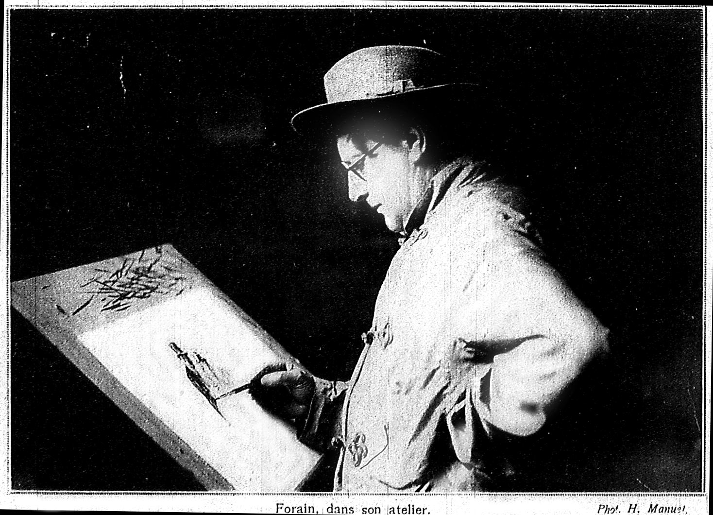 issue de la bibliothèque de reims.